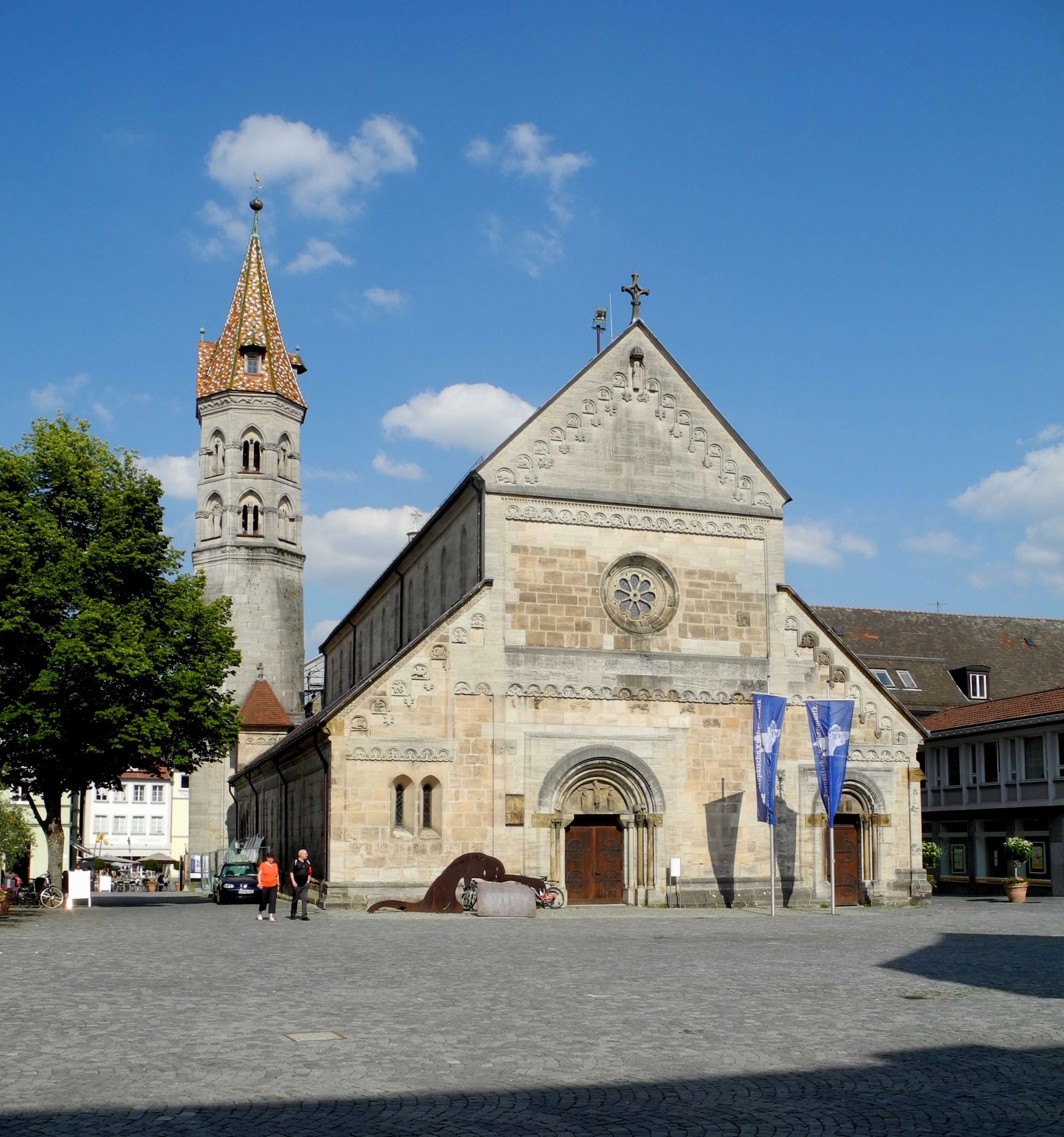 Schwäbisch Gmünd - Johanniskirche ab 1225, Westfassade